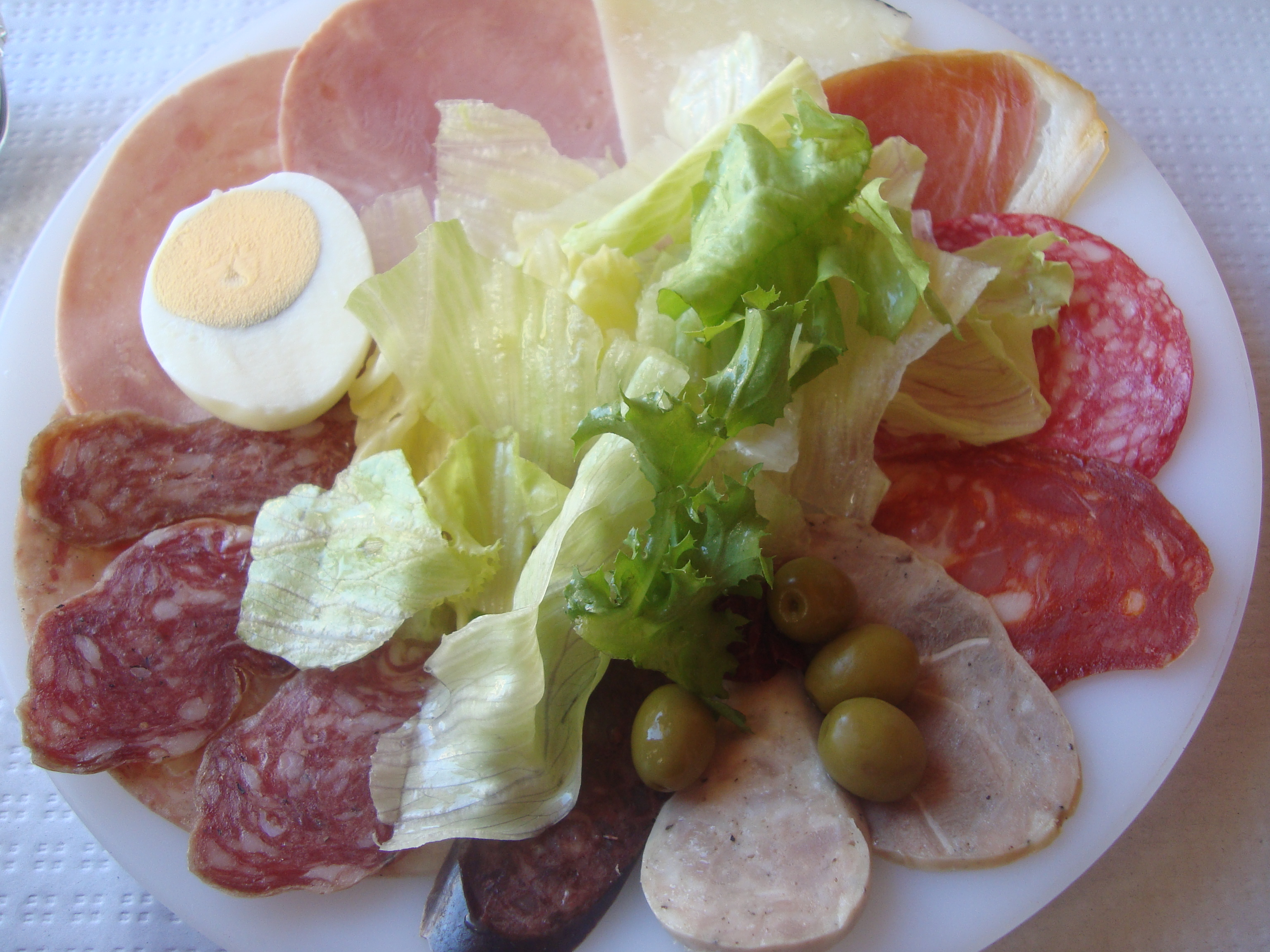 Entremés, plato frío con una selección-degustación de quesos, embutidos y fiambres.